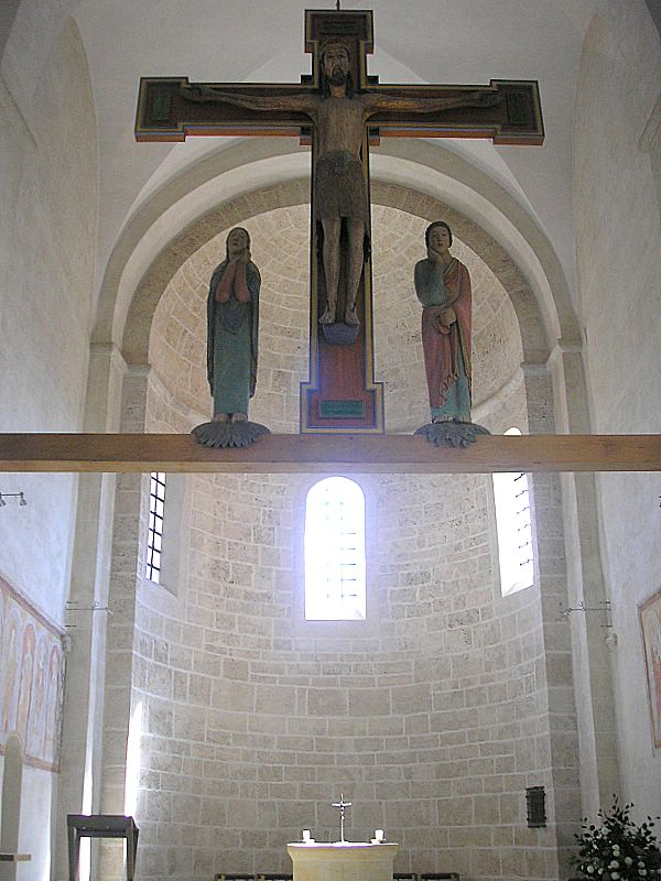 St. Michael (Altenstadt bei Schongau, Obb.). Der Chor mit dem "Großen Gott von Altenstadt" (um 1200). Eigene Aufnahme, Sept. 2006 / St. Michael (Altenstadt near Schongau, Upper Bavaria, Germany). The choir with the "Great God of Altenstadt" (ca. 1200). Own photo, Sept. 2006